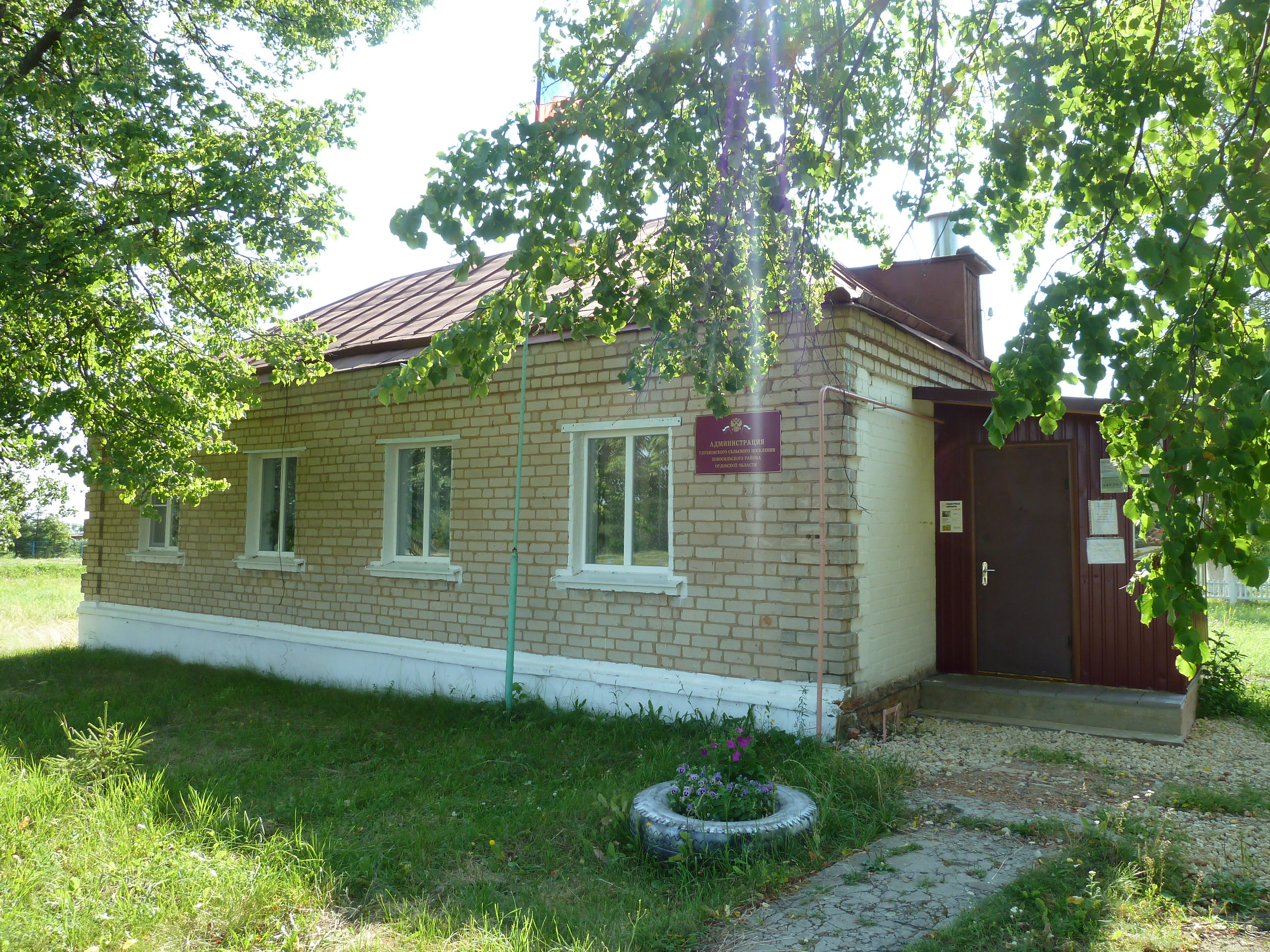 Здание администрации (сельсовета)